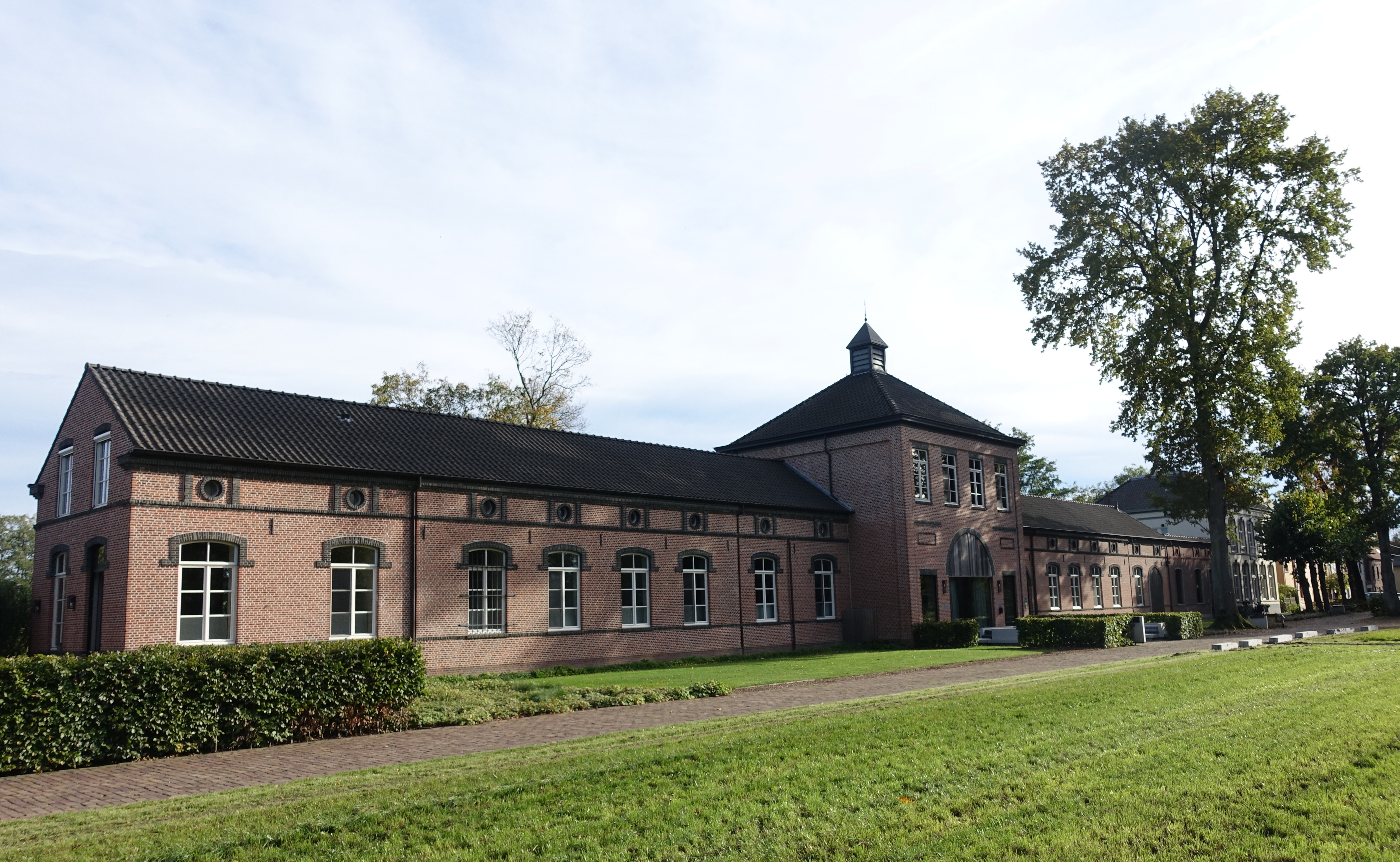 Voormalige sigarenfabriek uit de 2de helft van de 19de eeuw in Wijchmaal Peer